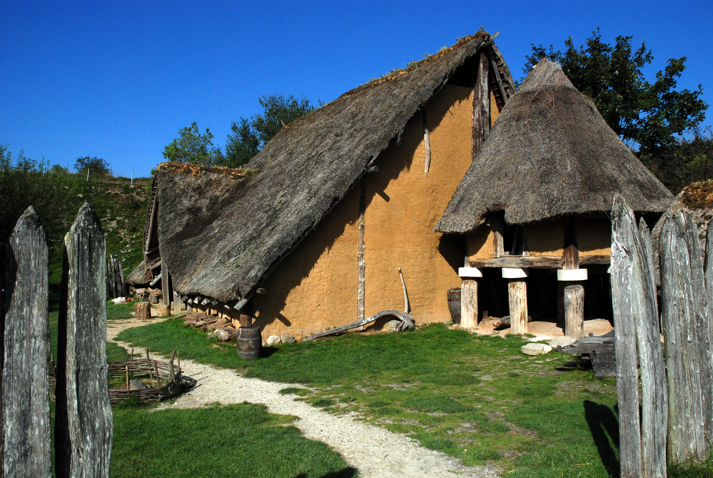 Reconstructie van een woning uit de ijzertijd in het park Samara vlak bij Amiens, Frankrijk